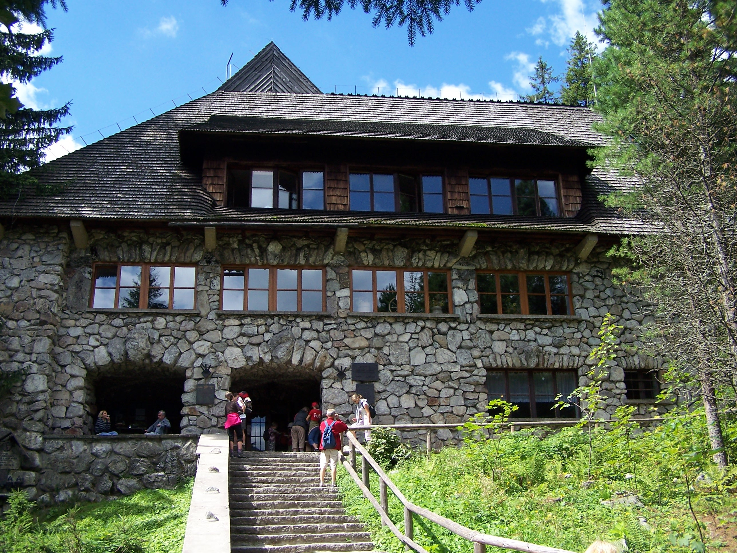 Schronisko Chochołowskie